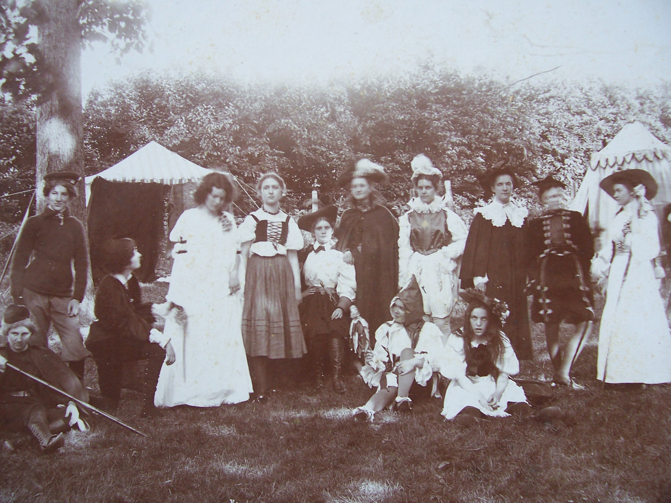 La troupe d'une heure au chateau d'etupes